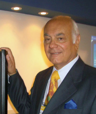 Foto de Oscar Bonello en el stand de Solidyne en CAPER